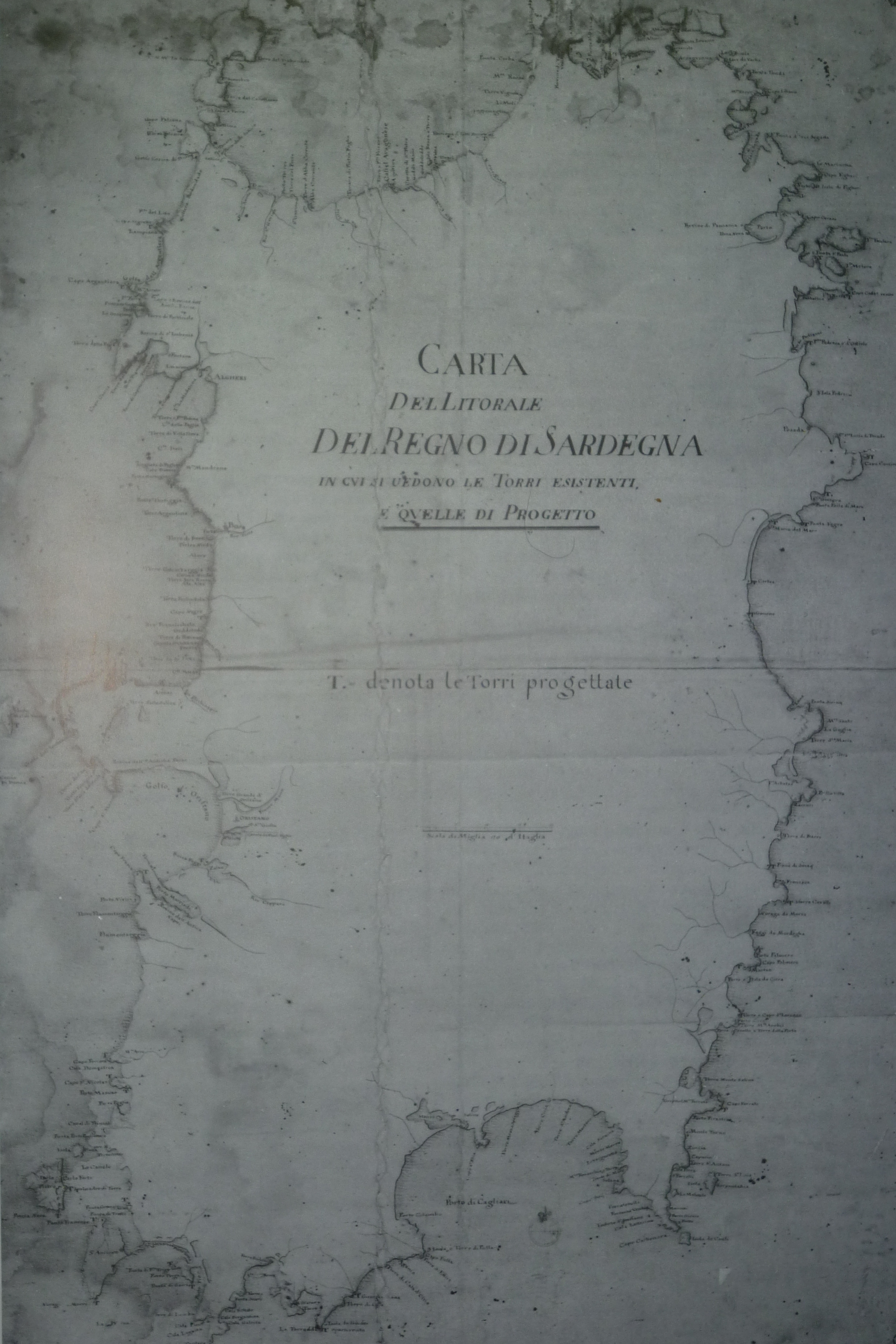 "Carta del litorale del Regno di Sardegna in cui si vedono le torri esistenti e quelle in progetto", Cagliari, Biblioteca Universitaria, 1720